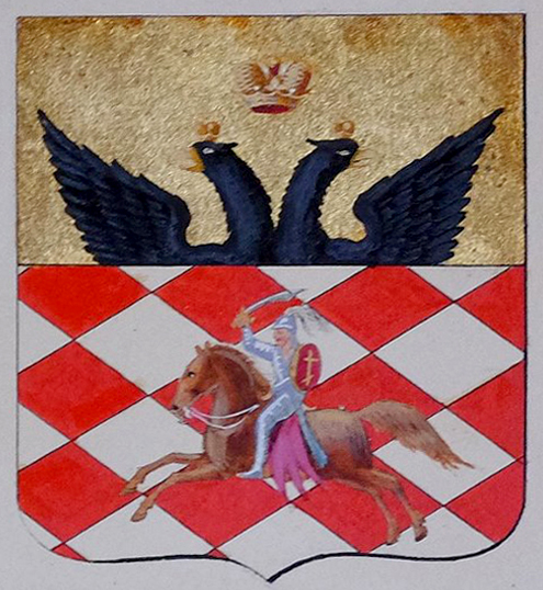 Беларуская (тарашкевіца): Вяліж (Vialiž). Герб места з «Пагоняй» («Pahonia»)